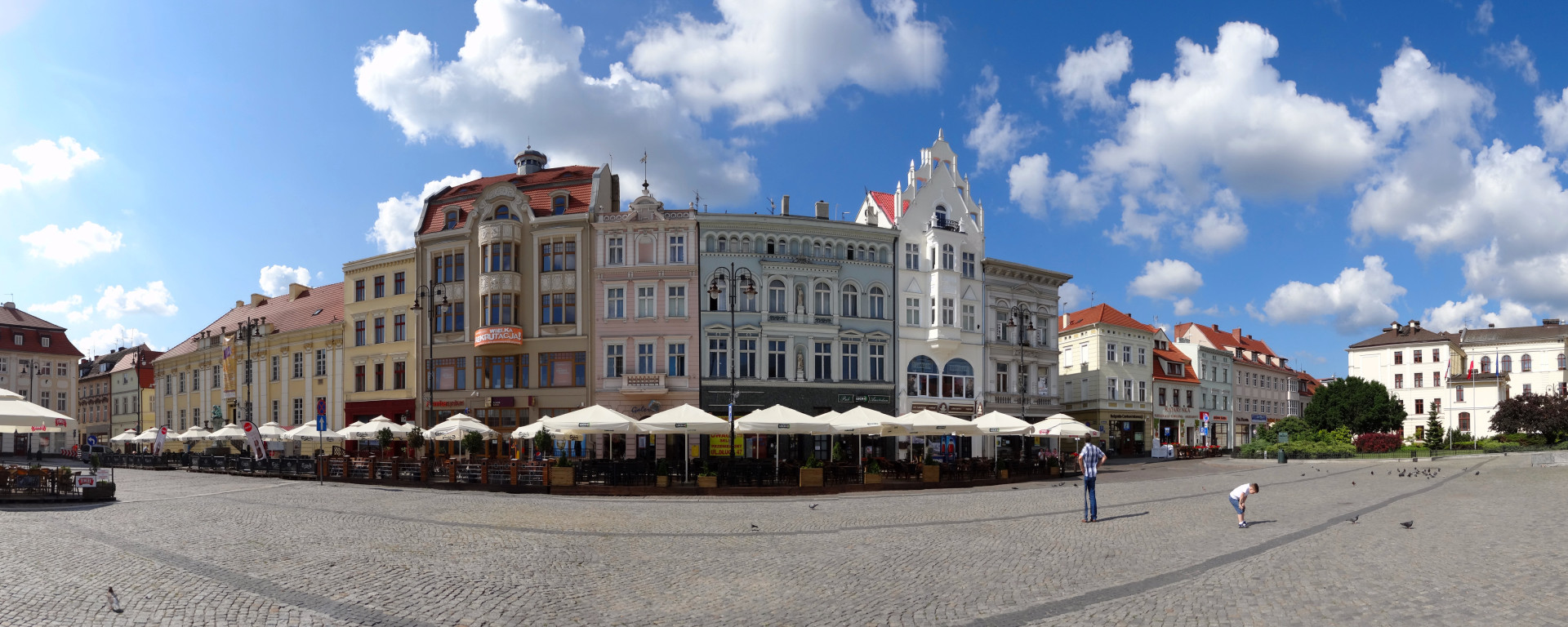 Stary Rynek w Bydgoszczy - zdjęcie panoramiczne